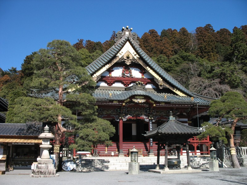 Immagine del tempio buddhista giapponese Kuon-ji